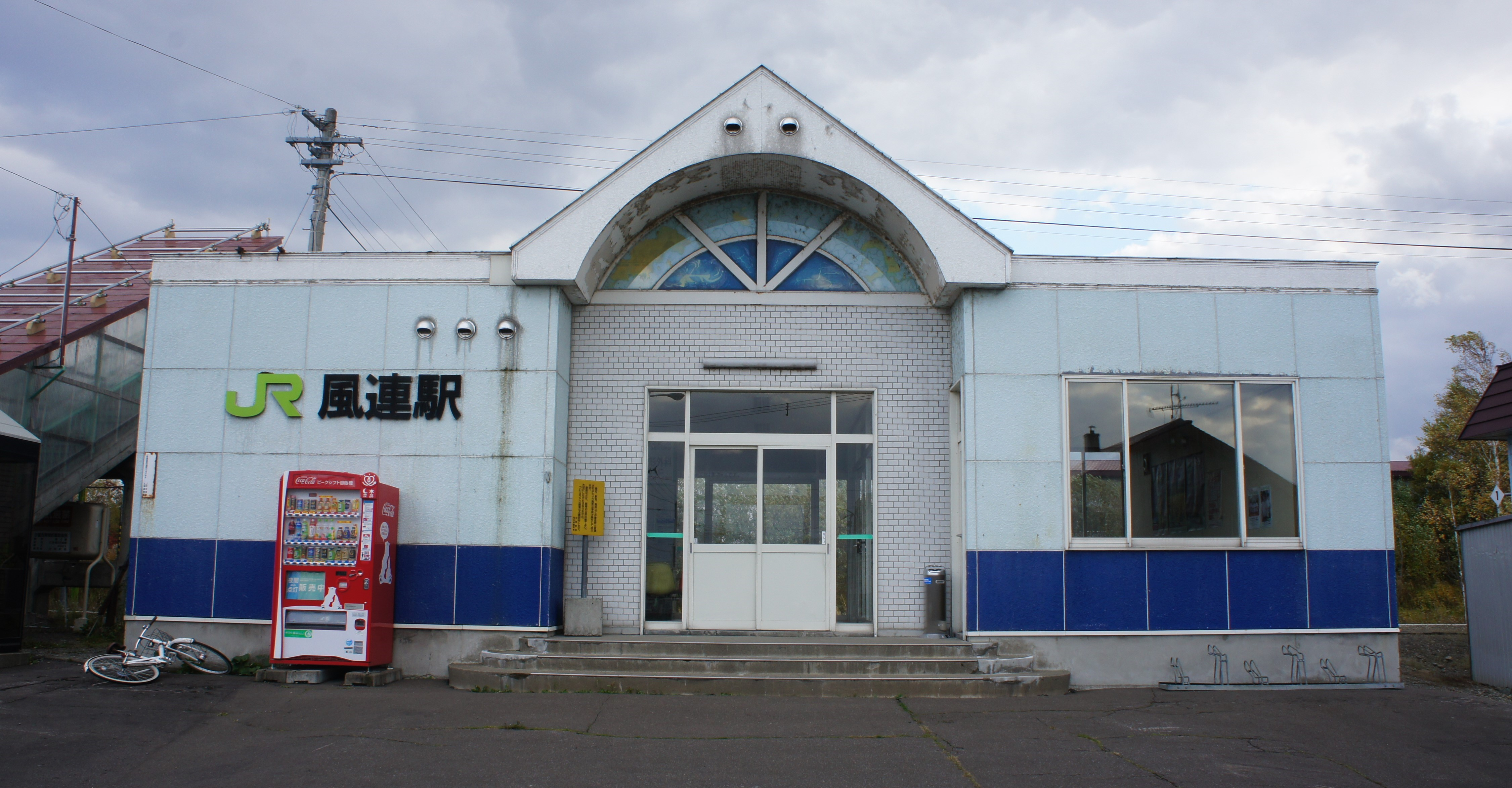 JR宗谷本線・風連駅の駅舎 Sony NEX-3